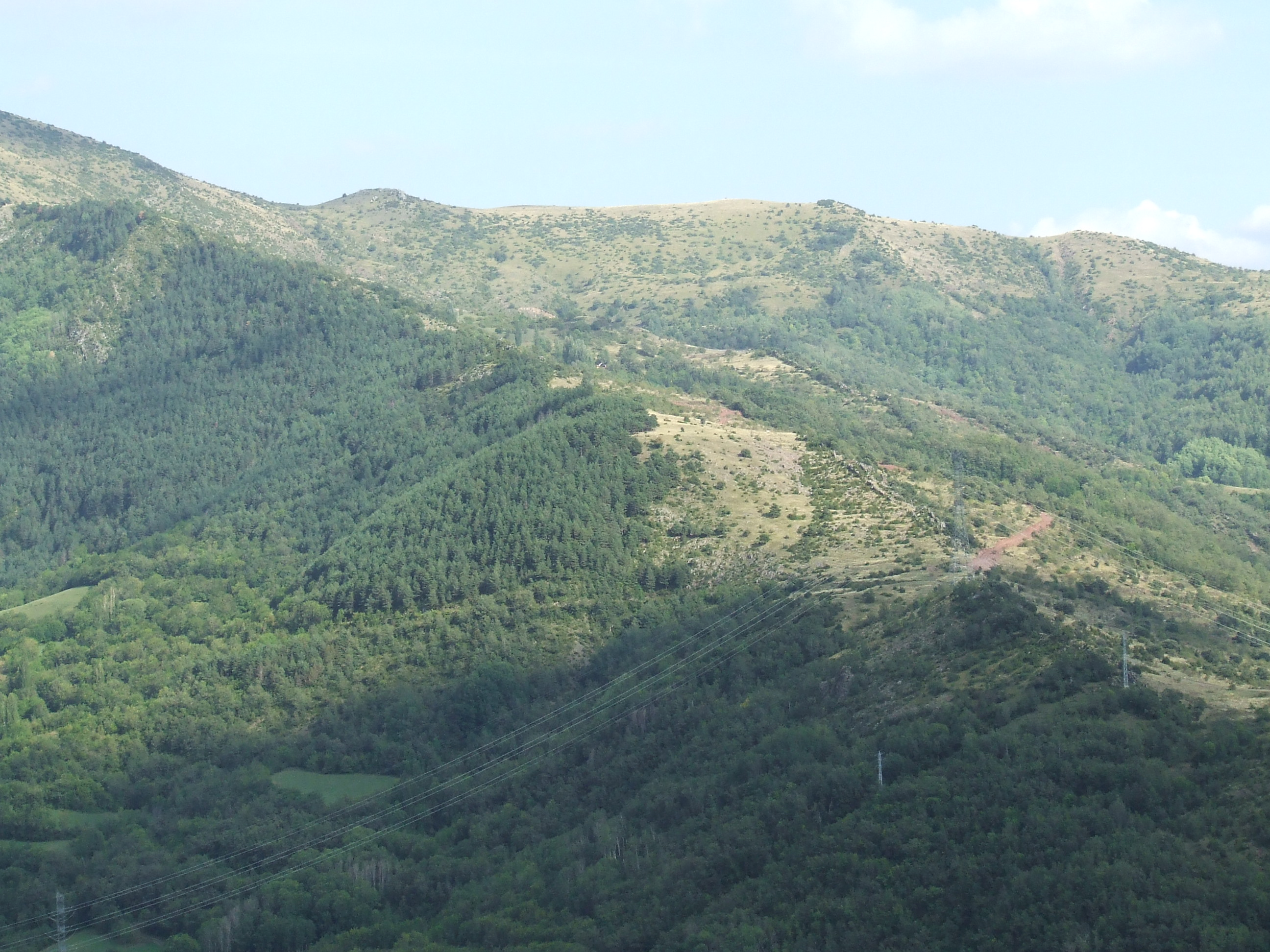 Serrat de Rascars (Mont-ros, la Torre de Cabdella, Pallars Jussà)